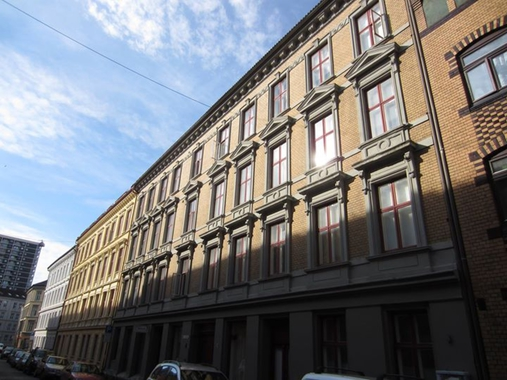 Urtegata, nærmest nr. 39